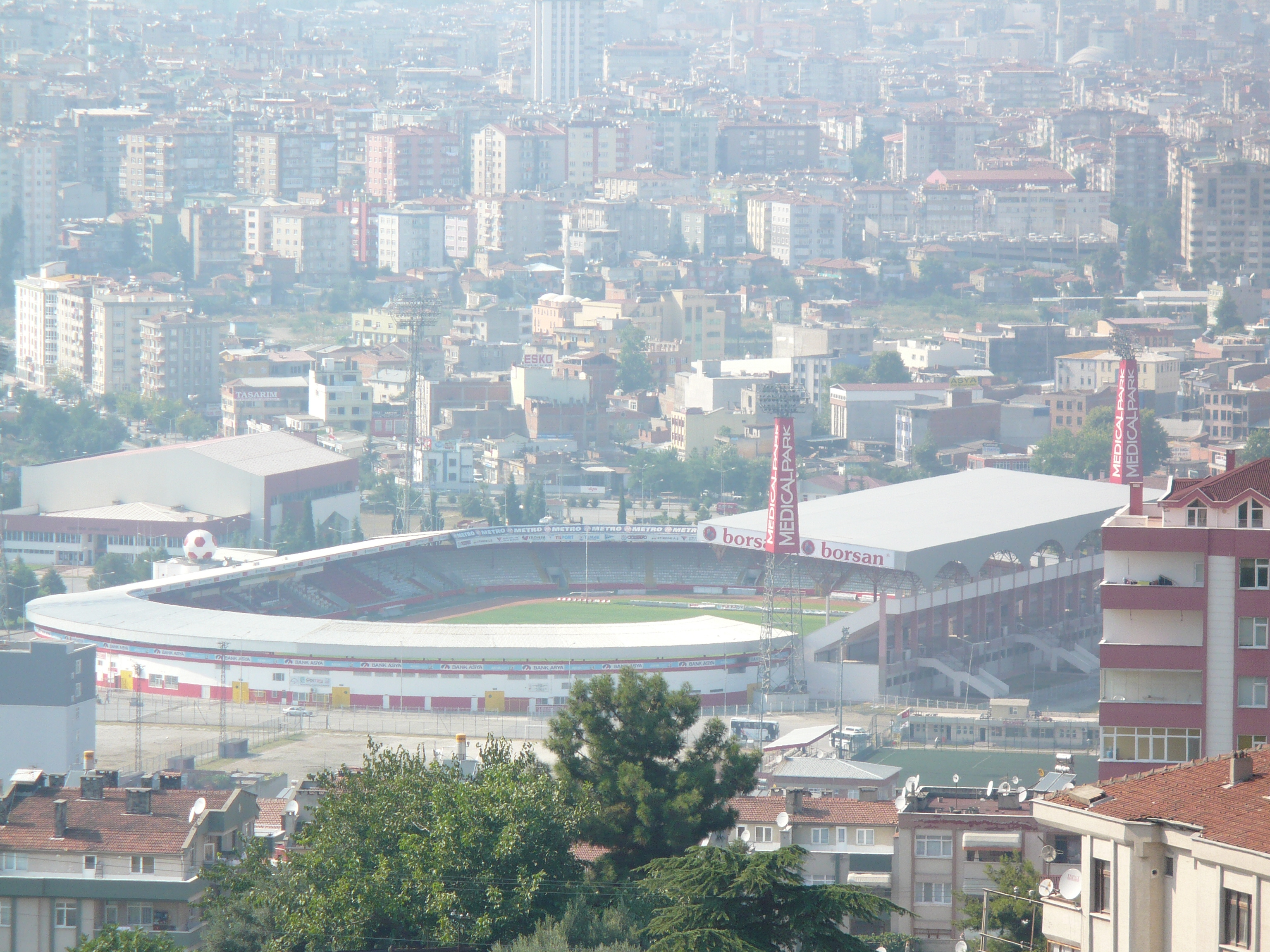 Samsun'dan çeşitli görüntüler